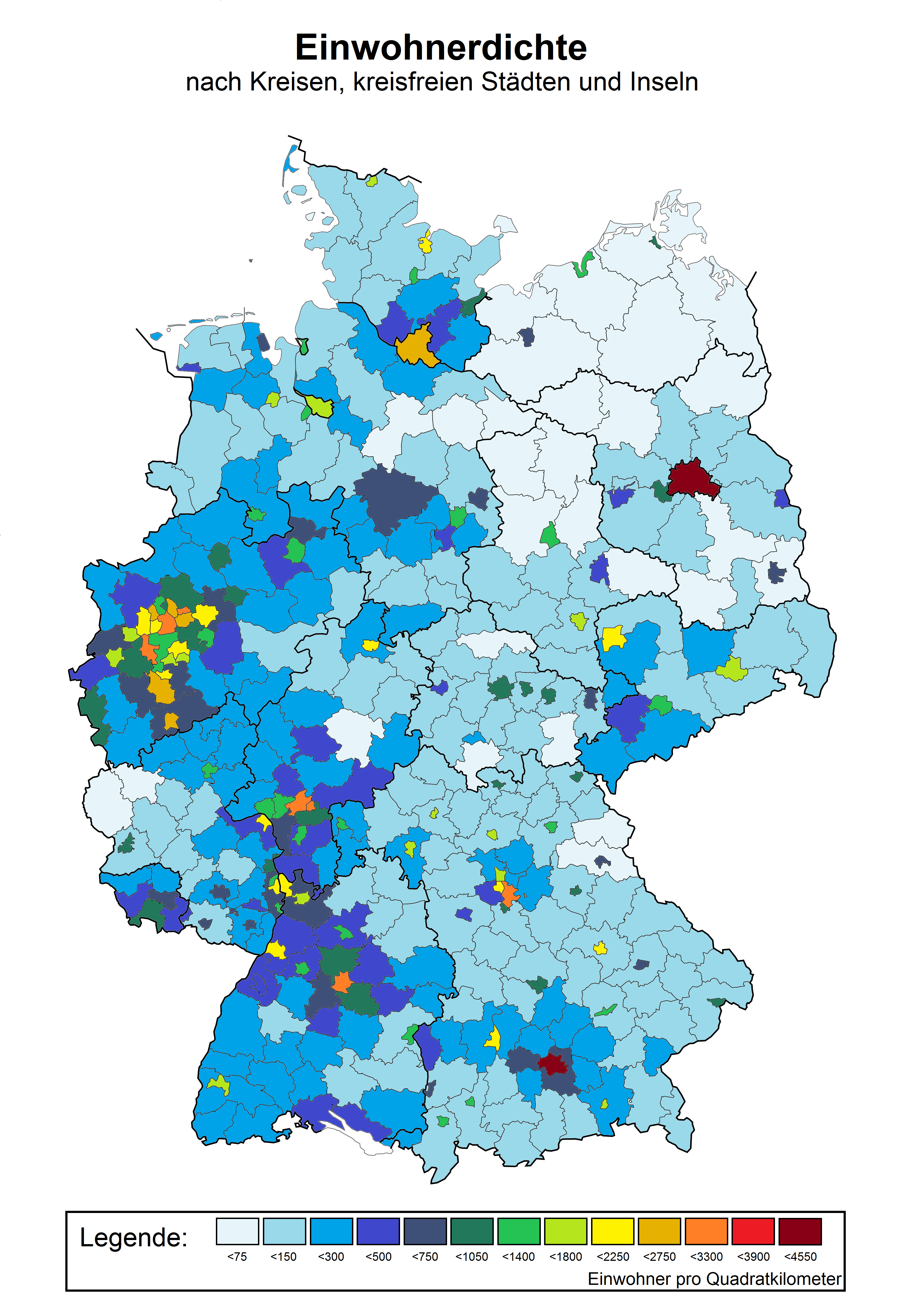 Einwohnerdichte Deutschland nach Kreisen, kreisfreien Städten und Inseln am 31. Dezember 2018